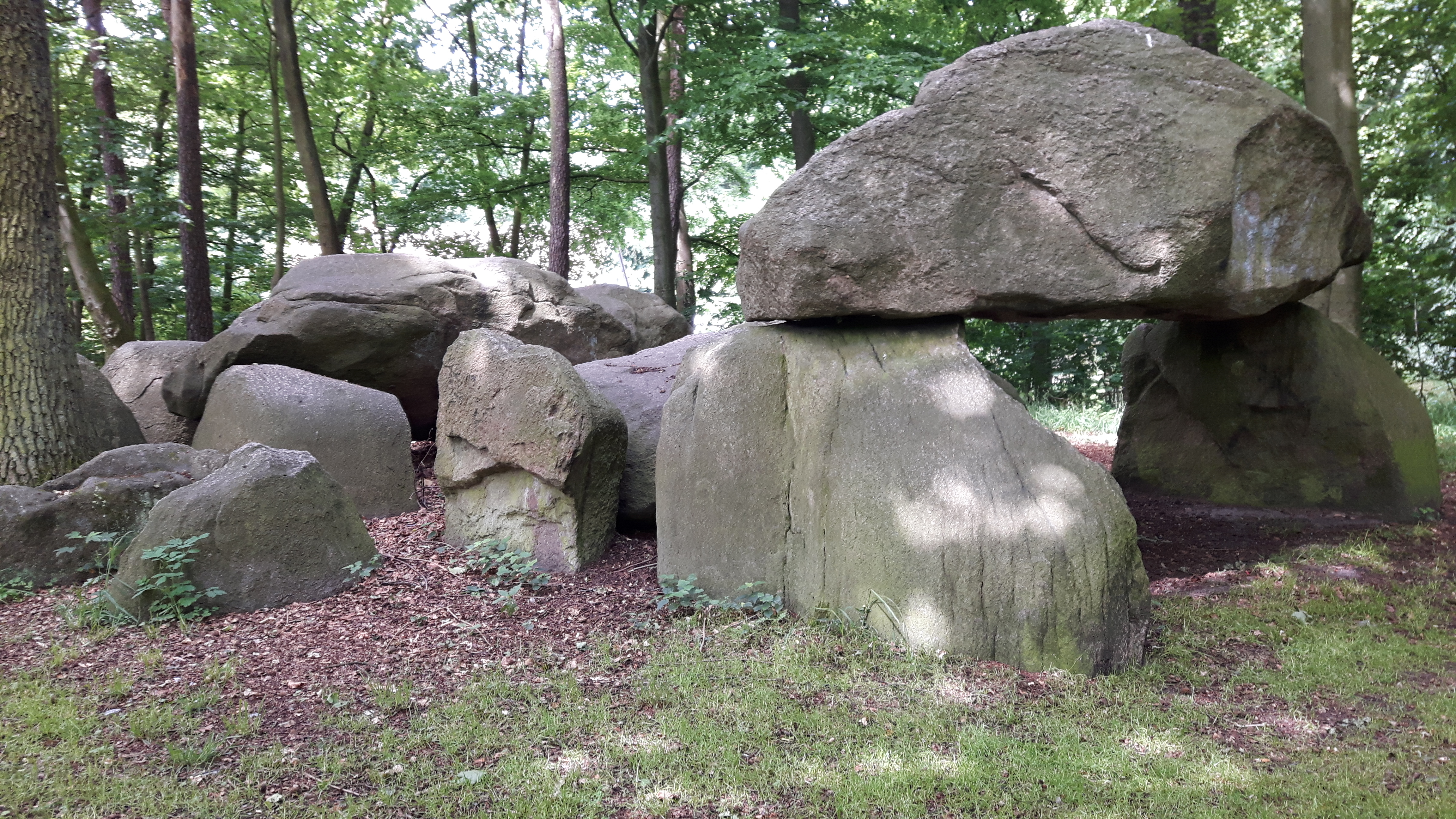 Hunebed bij Osnabrück